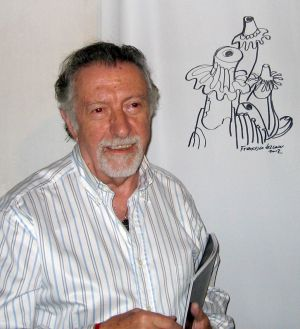 Retrato de Paco Lezcano junto a uno de sus dibujos.